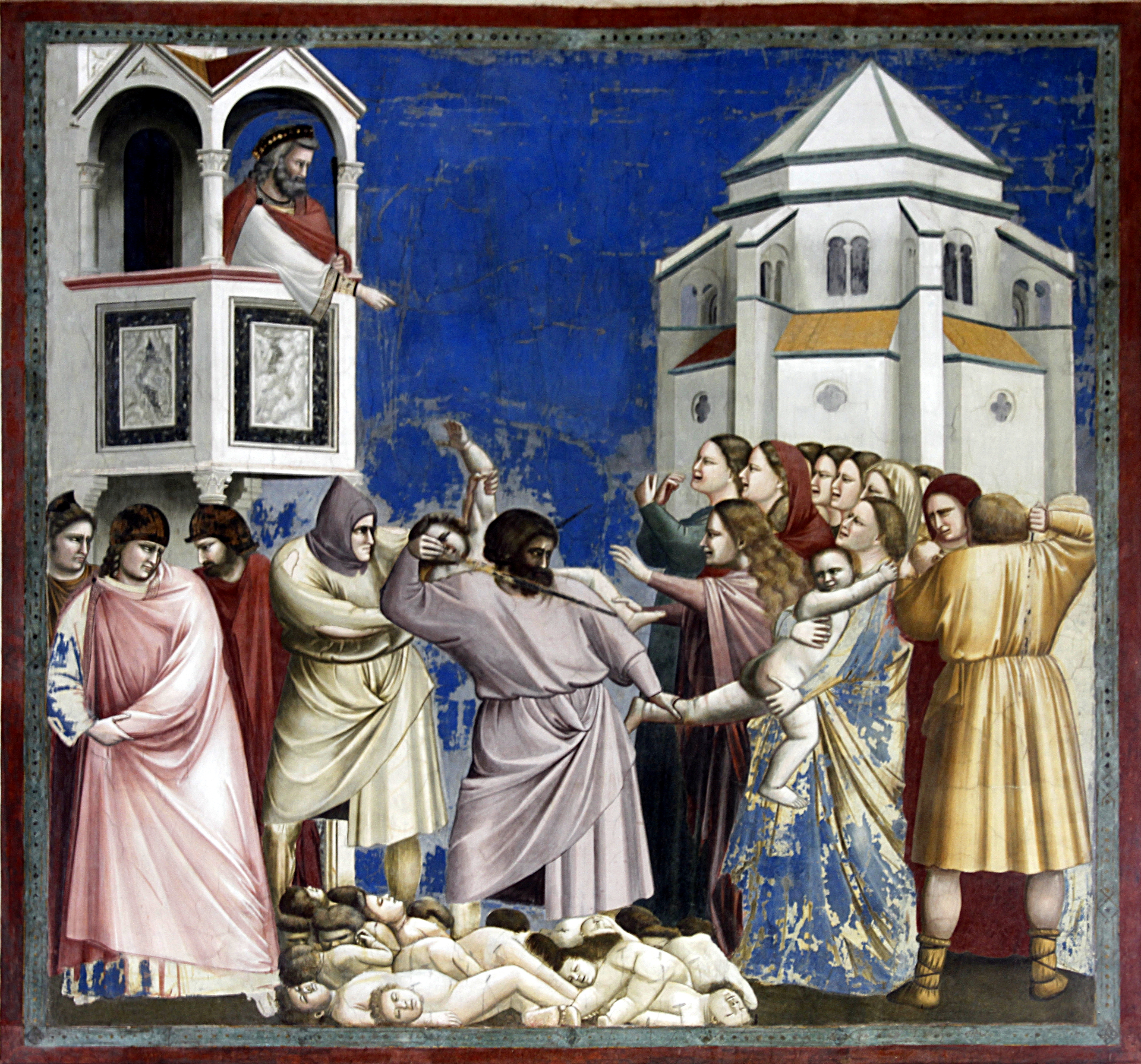 Capella dei Scrovegni - Padua